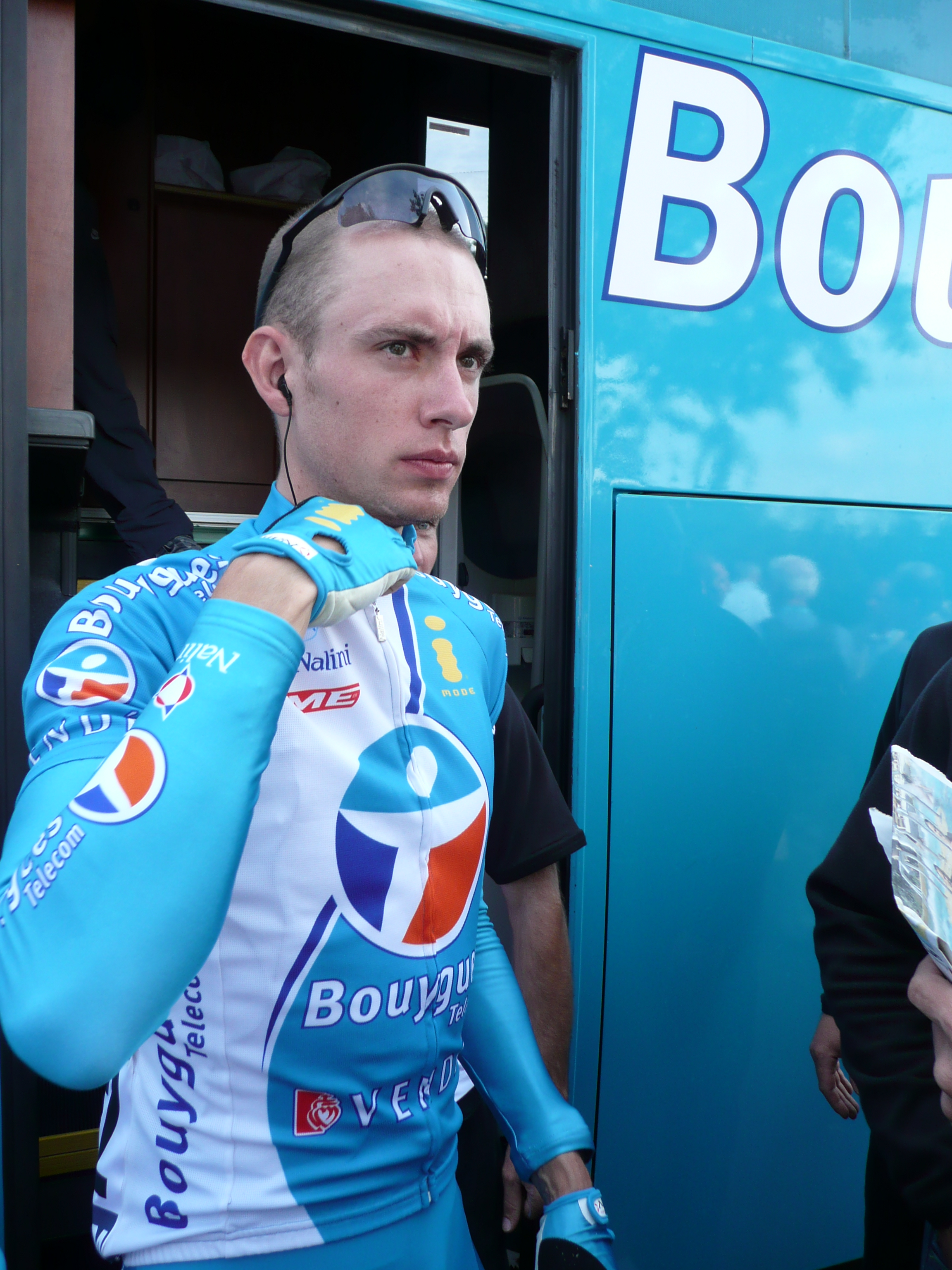 Stef Clement tijdens de Tour 2007